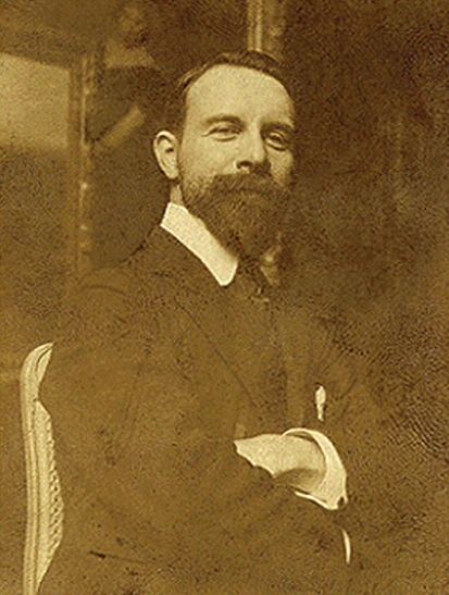 Portrait du peintre belge Herman Richir (Ixelles, 1866 - Uccle, 1942)